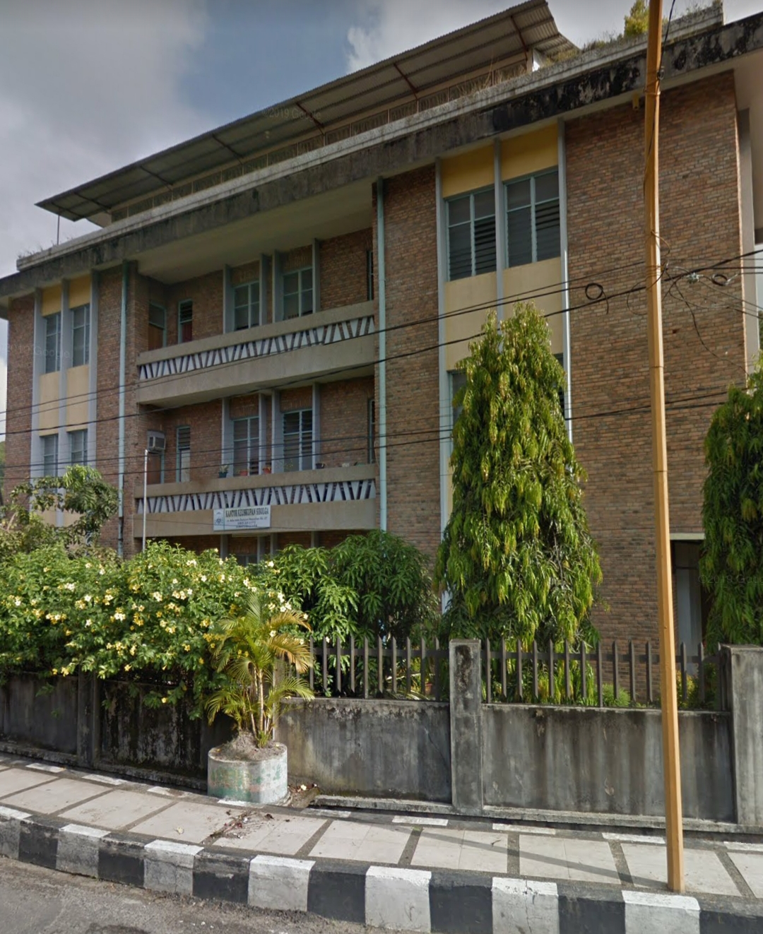 Gedung Keuskupan Sibolga